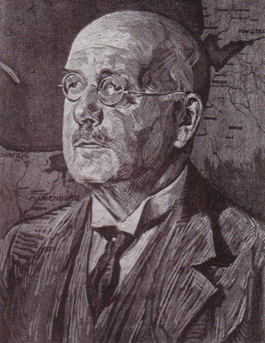 Lithographie von Friedrich von Berg (Markienen)